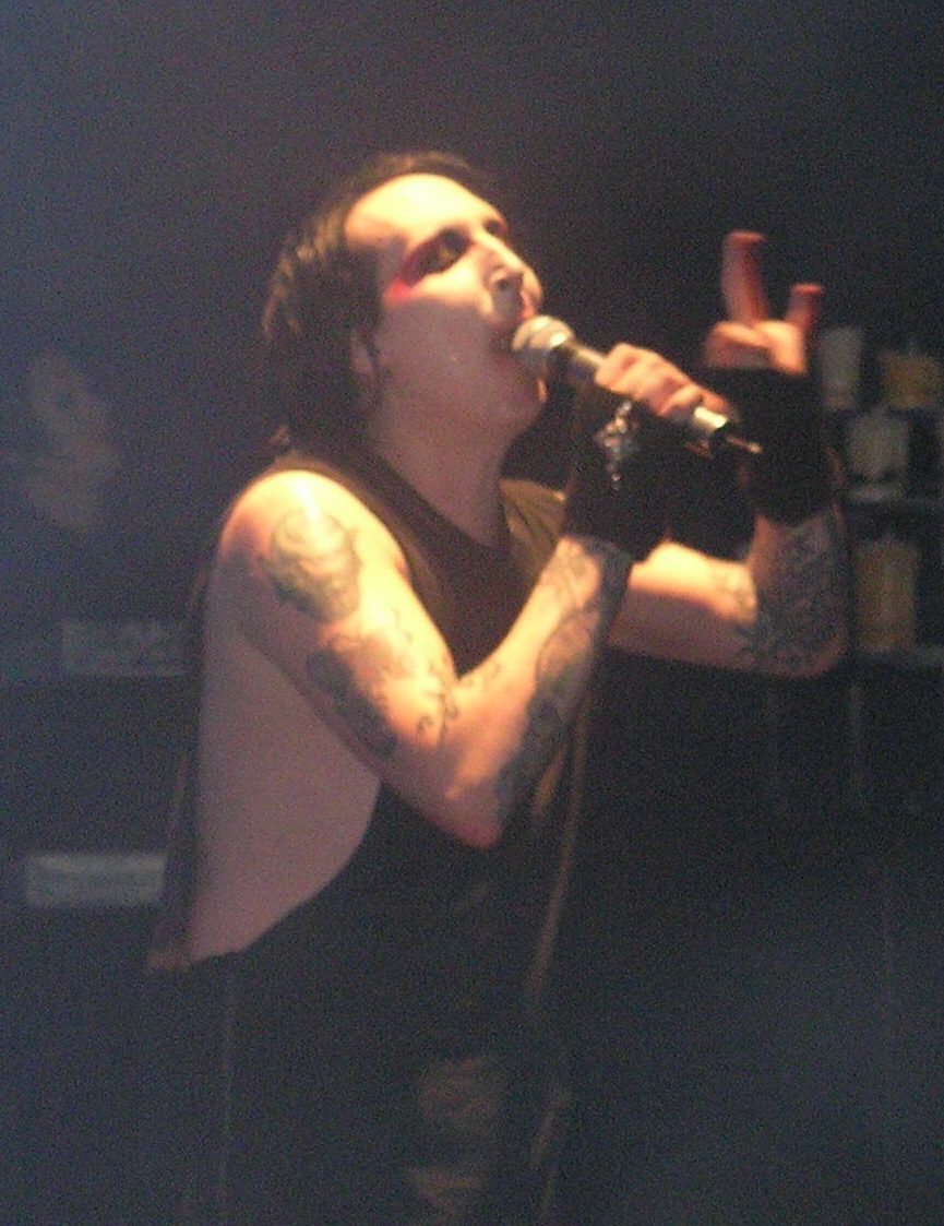 Marilyn Manson live in Ljubljana, Slovenia